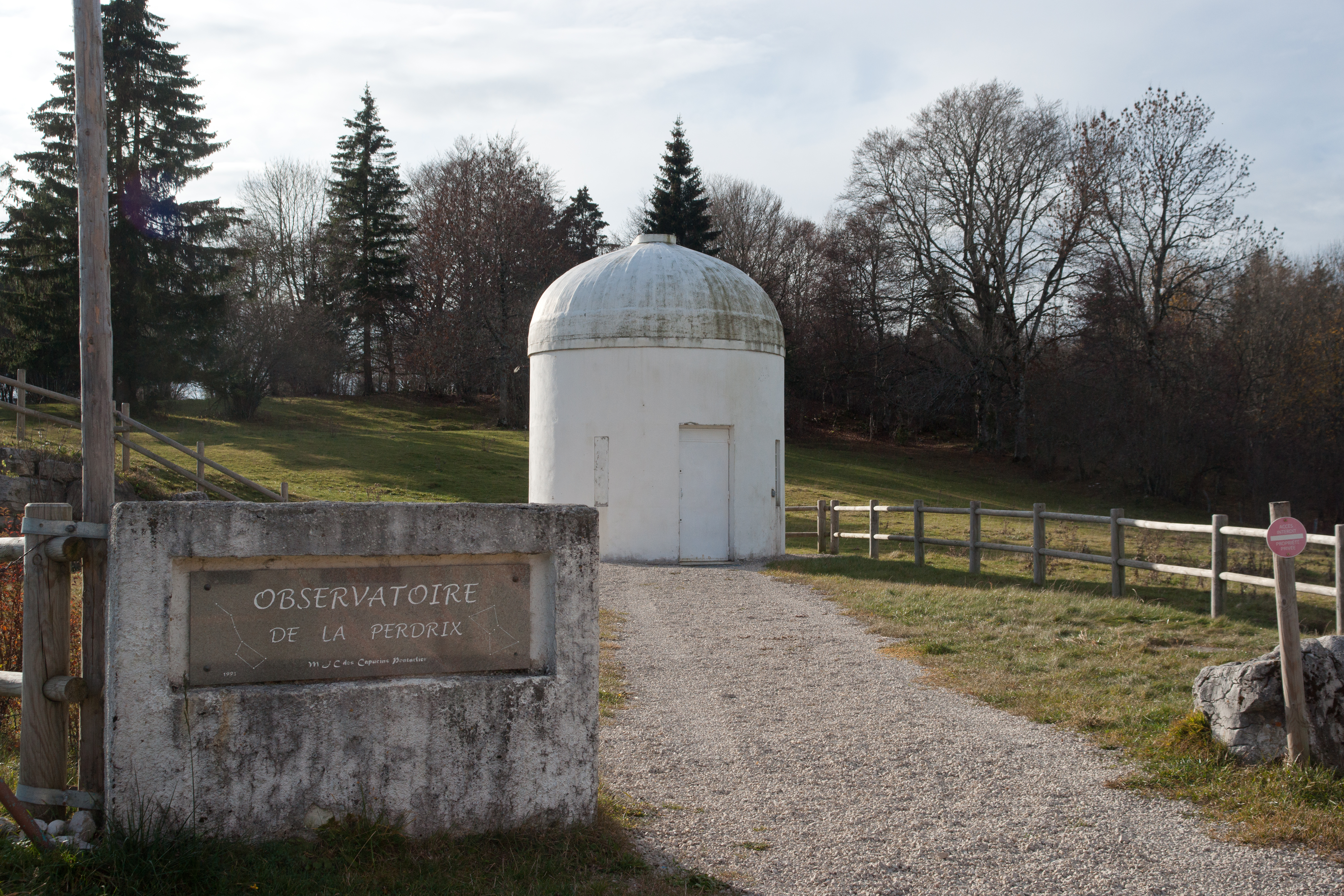 Observatoire de la Perdrix, Doubs, France.